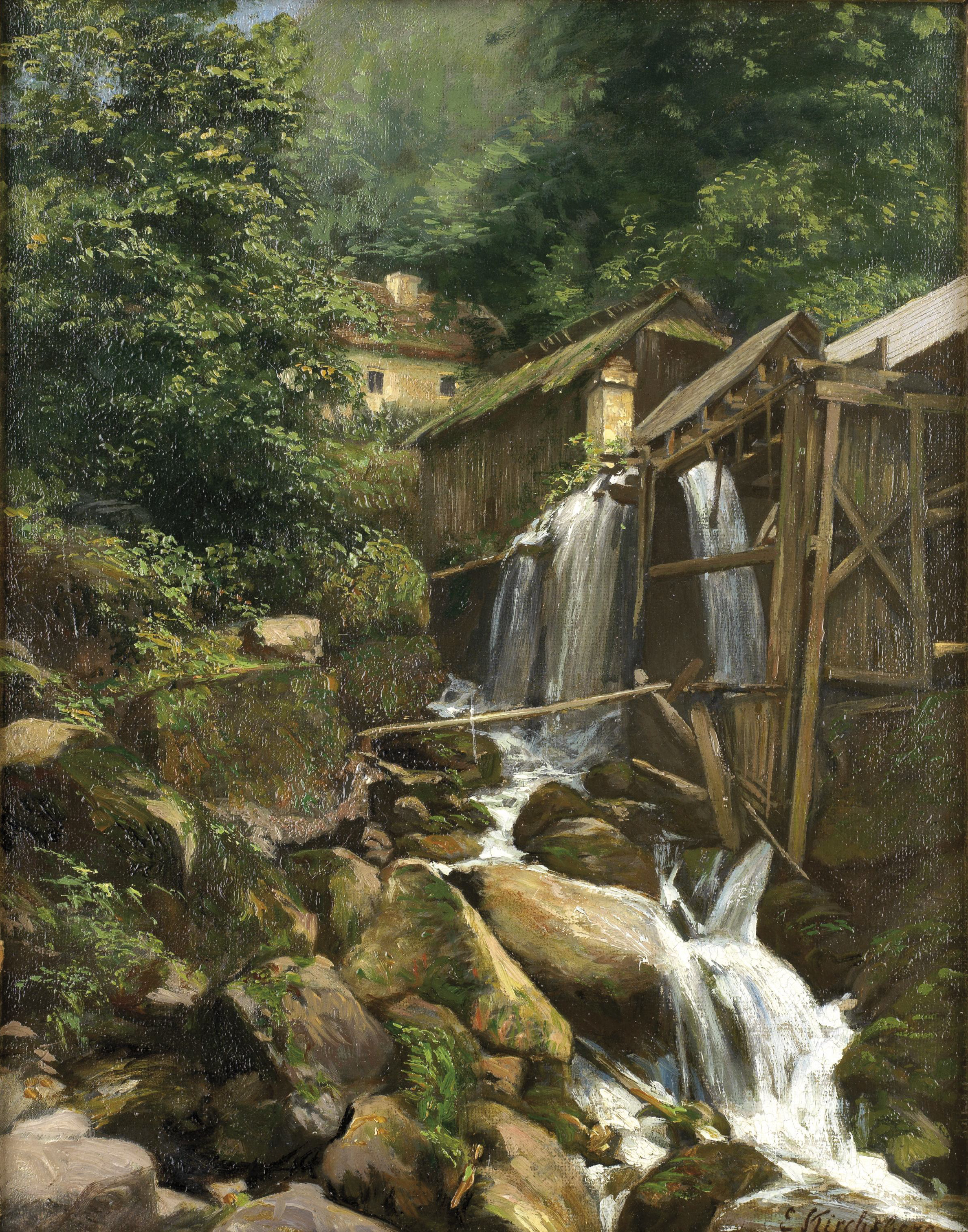 Verfallene Mühle